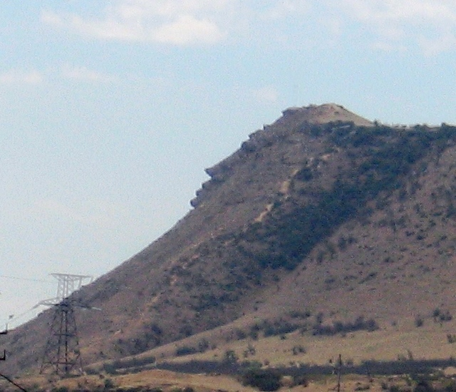 Гора Пушкин. Дагестан. Недалеко от Дербента. Природный феномен This image is related to the protected area of Russia number 0510020